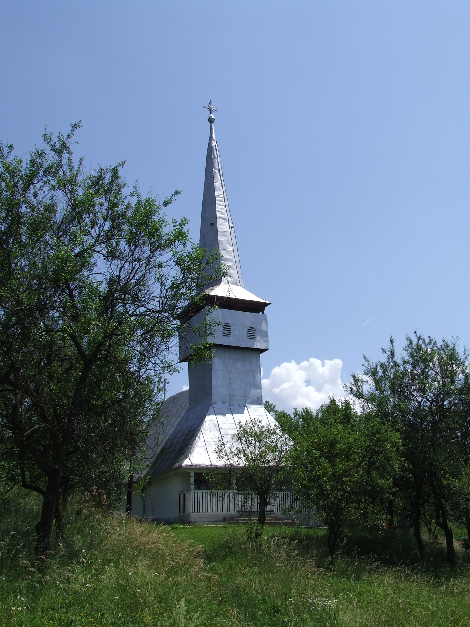 Biserica de lemn din Sântă Măria, judeţul Sălaj. Autor: Bogdan Ilieş Data: iunie 2007